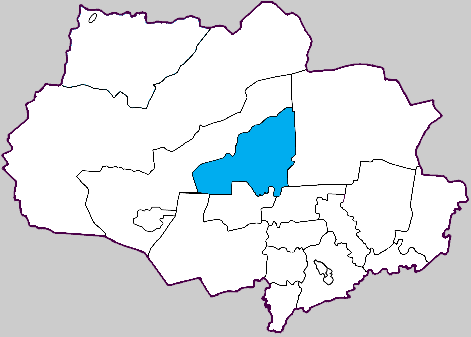 Колпашевский район Томской области